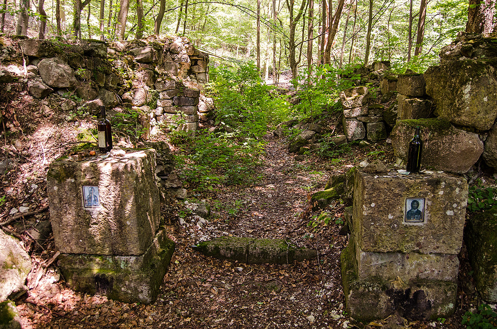 Остаци манастира Јешевац, општина Горњи Милановац